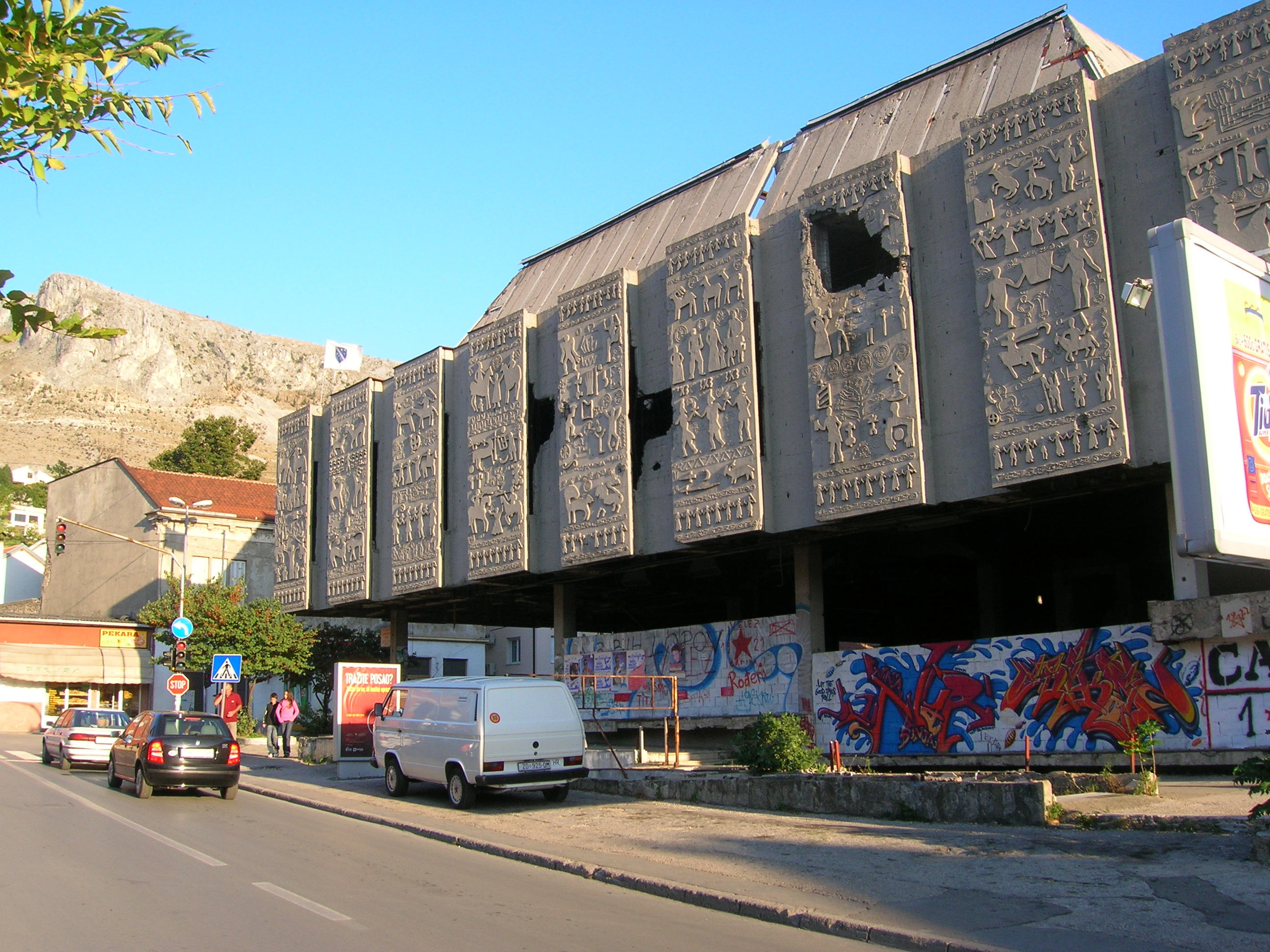 Street in Mostar